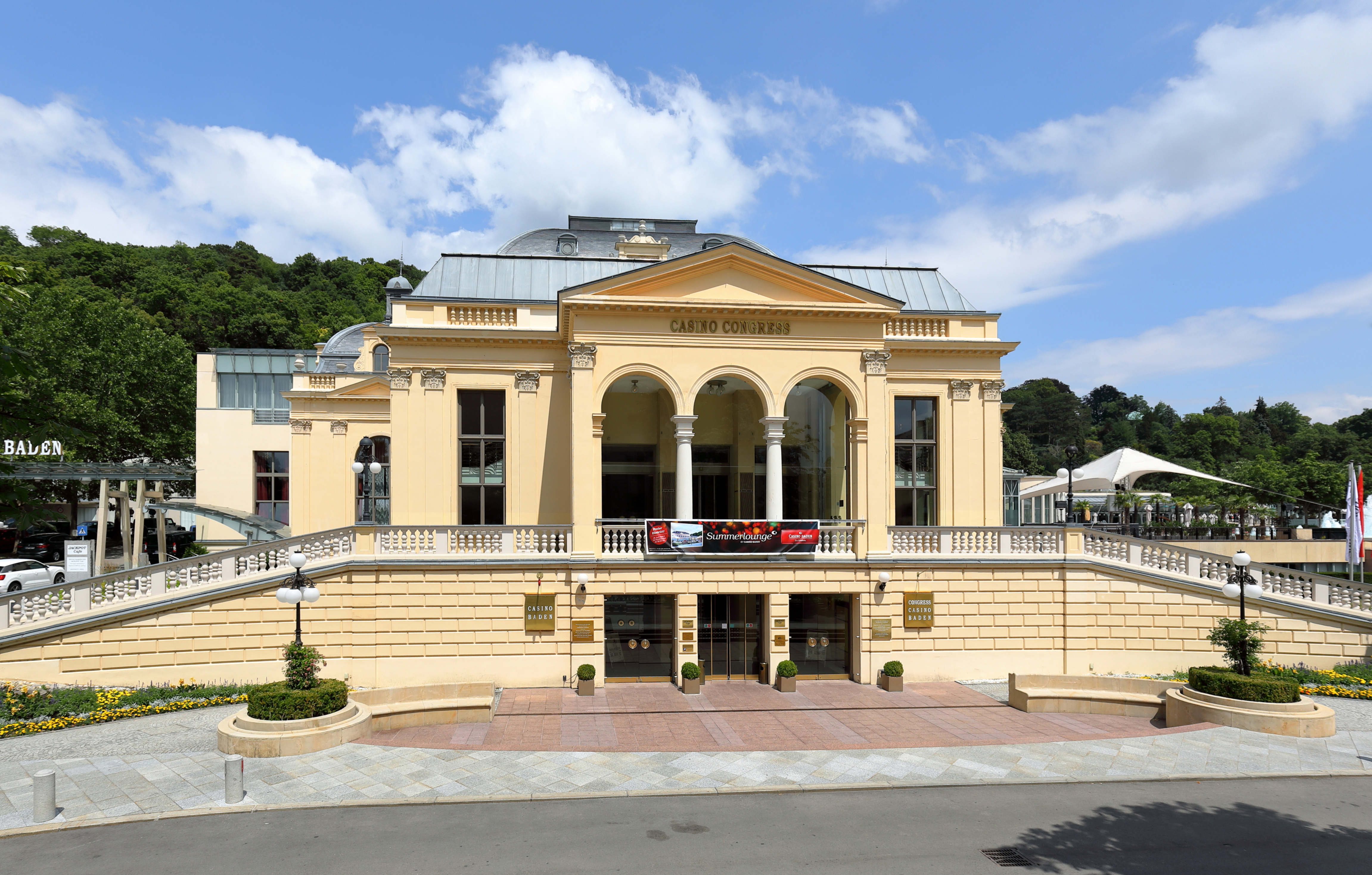 Das ehemalige Kurhaus und jetzige Casino sowie Kongress- und Veranstaltungszentrum an der Adresse Kaiser-Franz-Ring 1 in der niederösterreichischen Stadt Baden.Das Bauwerk im Stil der Neorenaissance wurde ab 1884 nach Plänen der Architekten Eugen Fassbender und Maximilian Katscher (1858–1917) errichtet und am 10. Juni 1886 feierlich als neues Kurhaus eröffnet. Am 12. April 1934 wurde im Kurhaus das Badener Casino als erster Ganzjahresbetrieb Österreichs der damaligen Österreichischen Casino A. G. eröffnet. Nach einem großen Umbau ab 1992 fand im März 1995 die Eröffnung als größtes Casino Europas samt Kongress- und Veranstaltungszentrum statt.